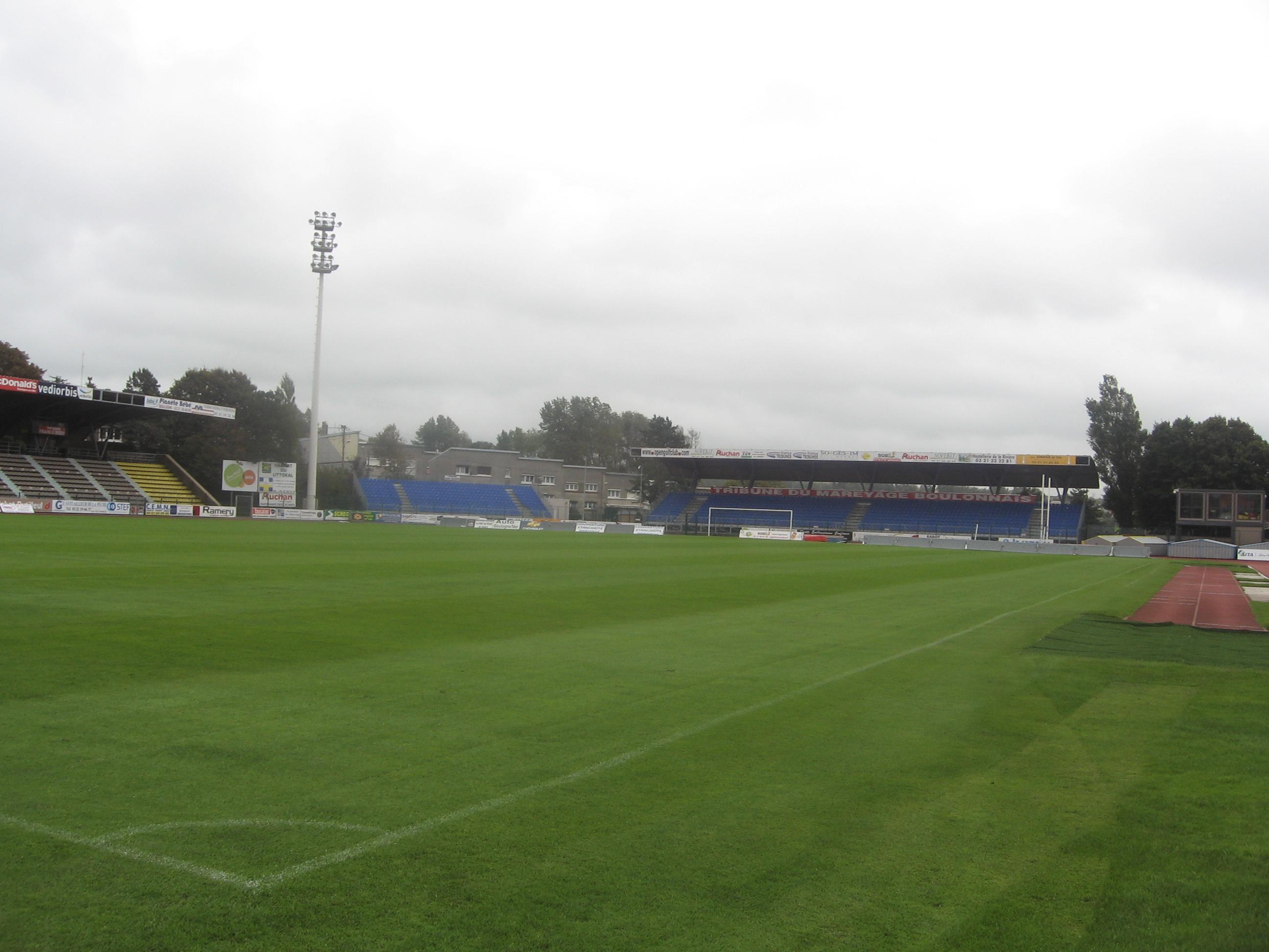 Photo of Stade de la Libération, Boulogne-sur-Mer, France